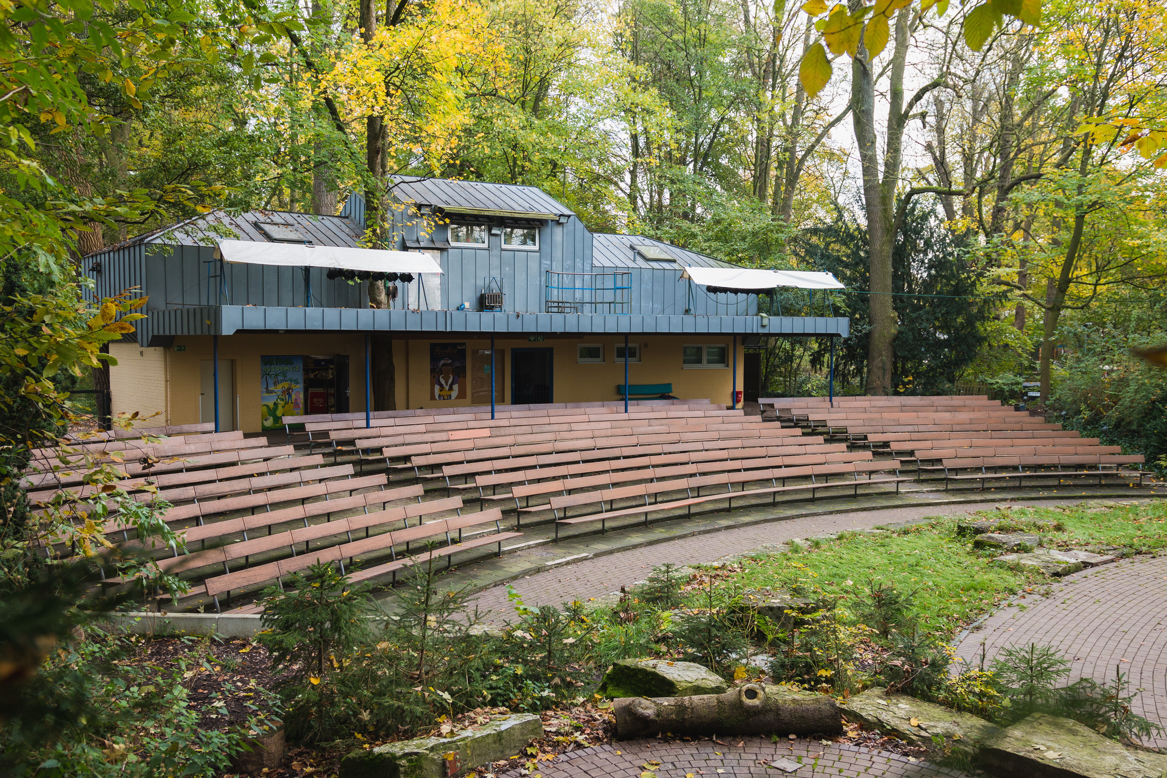 Das Foto zeigt das Bühnenhaus der Freilichtbühne Schloß Neuhaus in Paderborn inklusive des Zuschauerraums nach der Saison 2017.